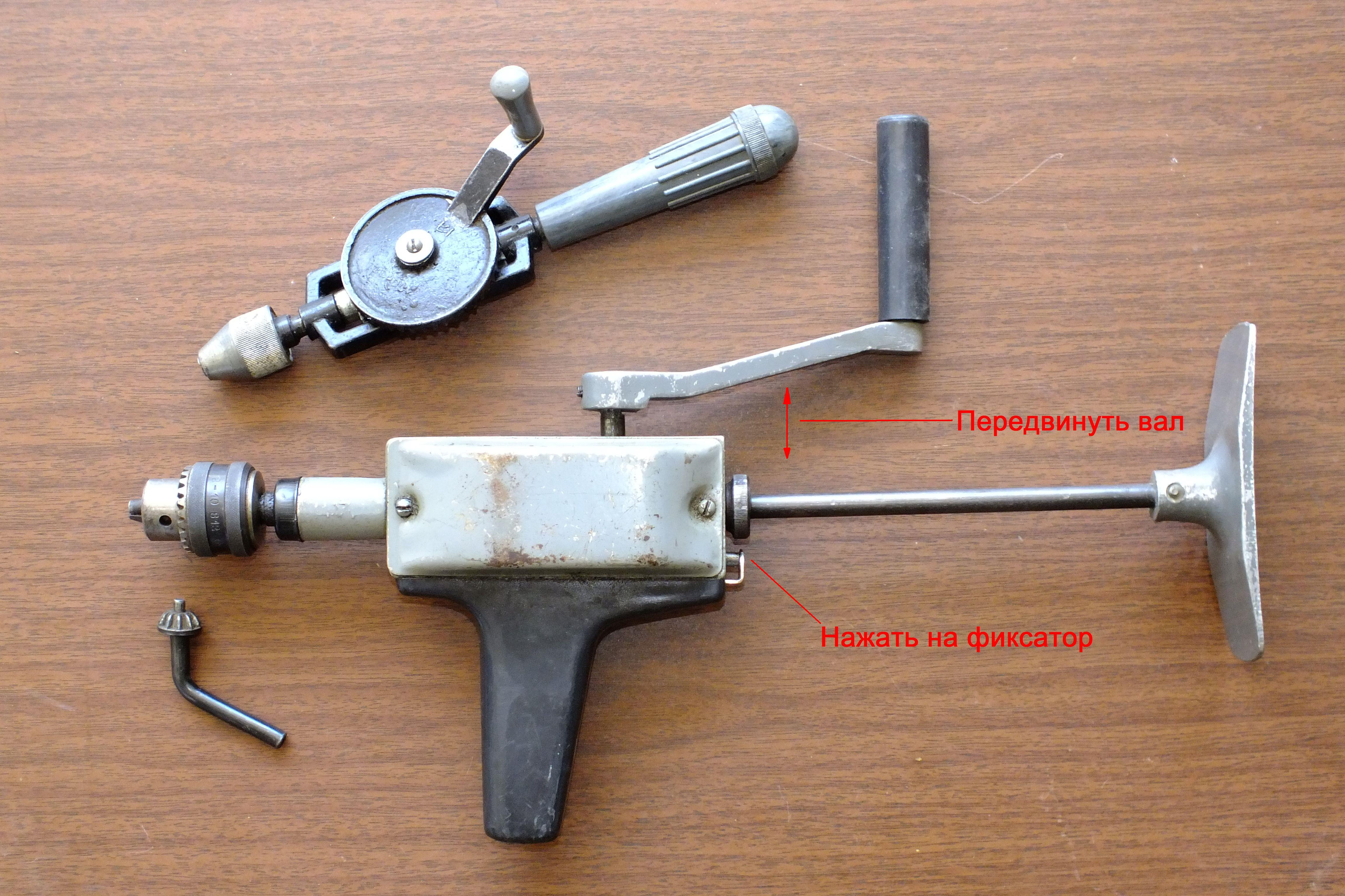 Hand-powered drills